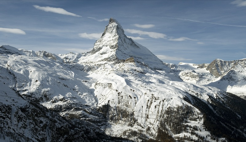 2008Nov10_switzerland_2385.jpg Zermatt